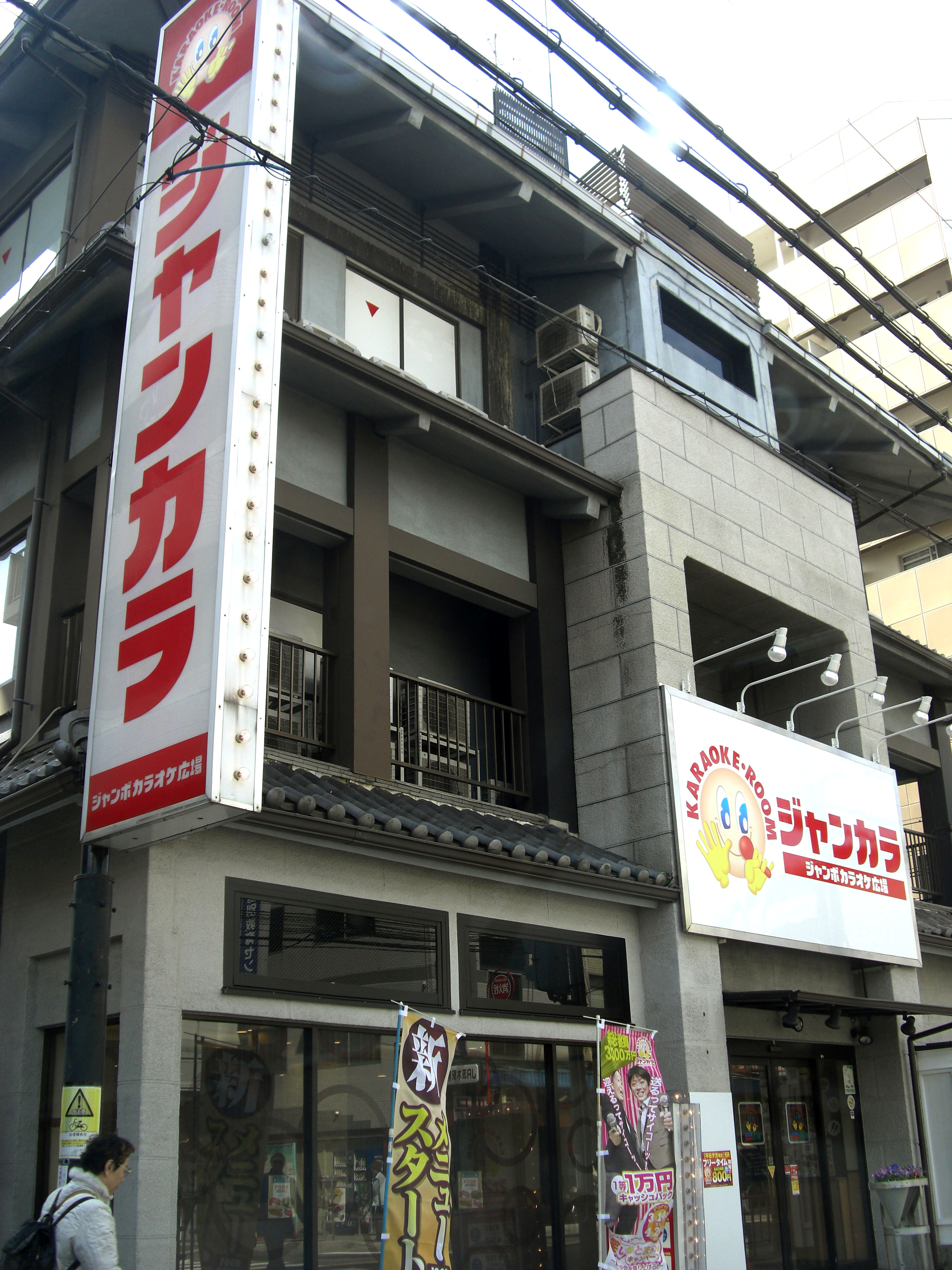 Jumbo Karaoke Hiroba JR Ibaraki,Ekimae Ibaraki-City Osaka Japan.